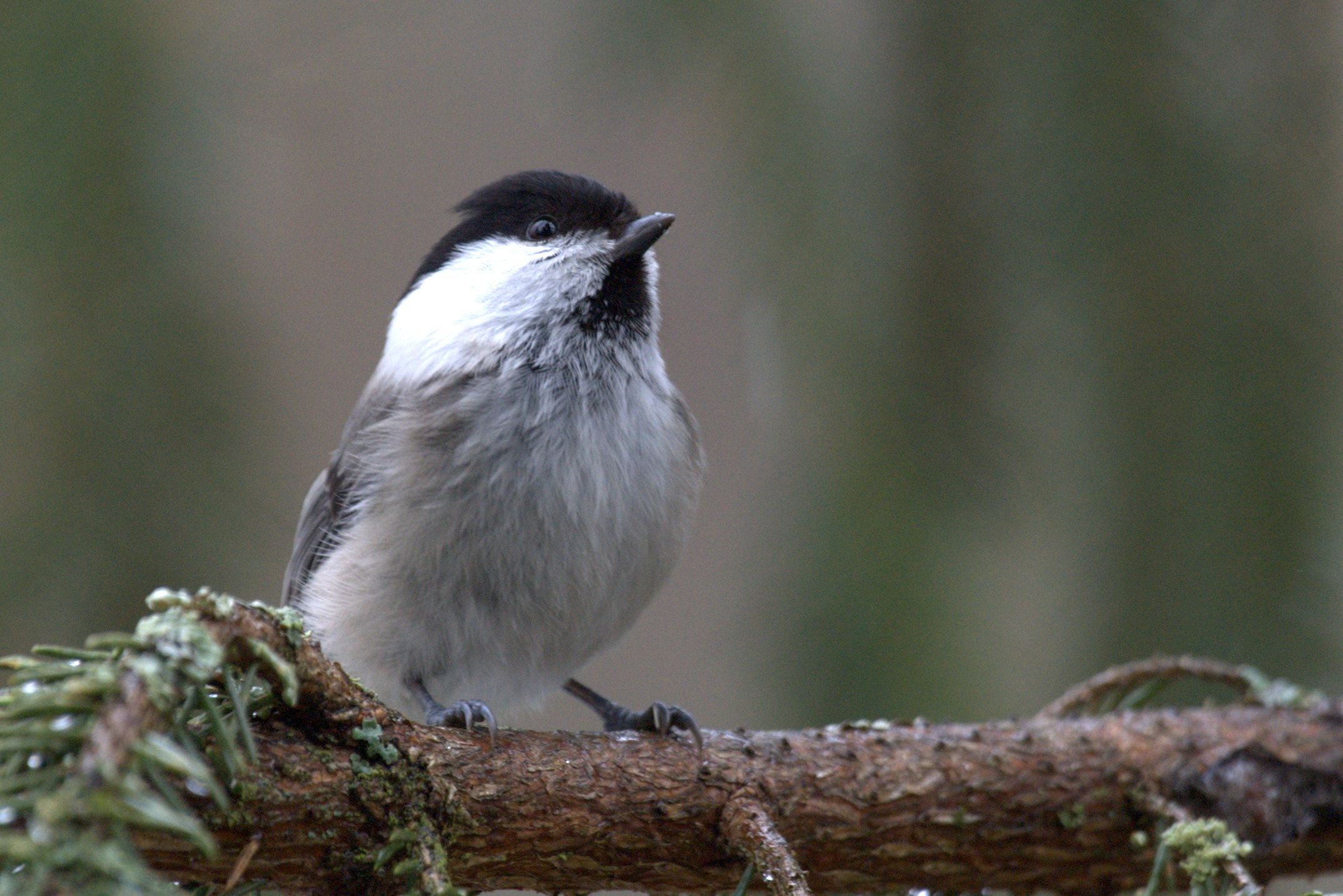 Kuvattu Pälkäneellä Luopioisten Puutikkalassa